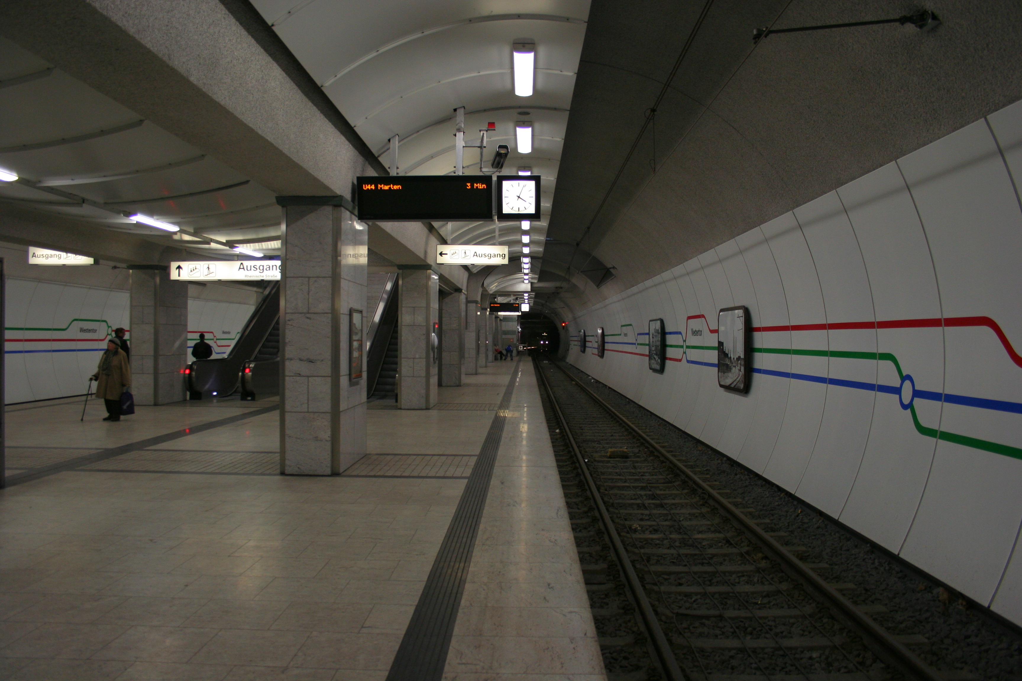 U-Bahnhof Westentor der Stadtbahn Dortmund